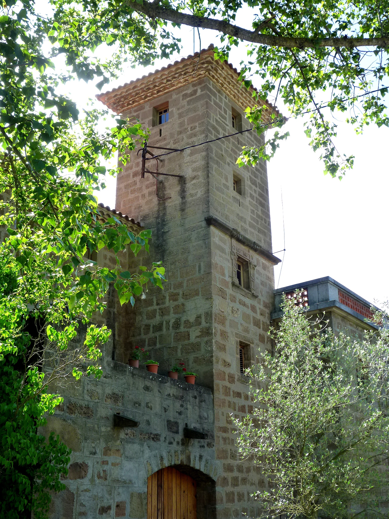 Torre de casa Xixons, al nucli de Santa Susanna, del municipi de Riner